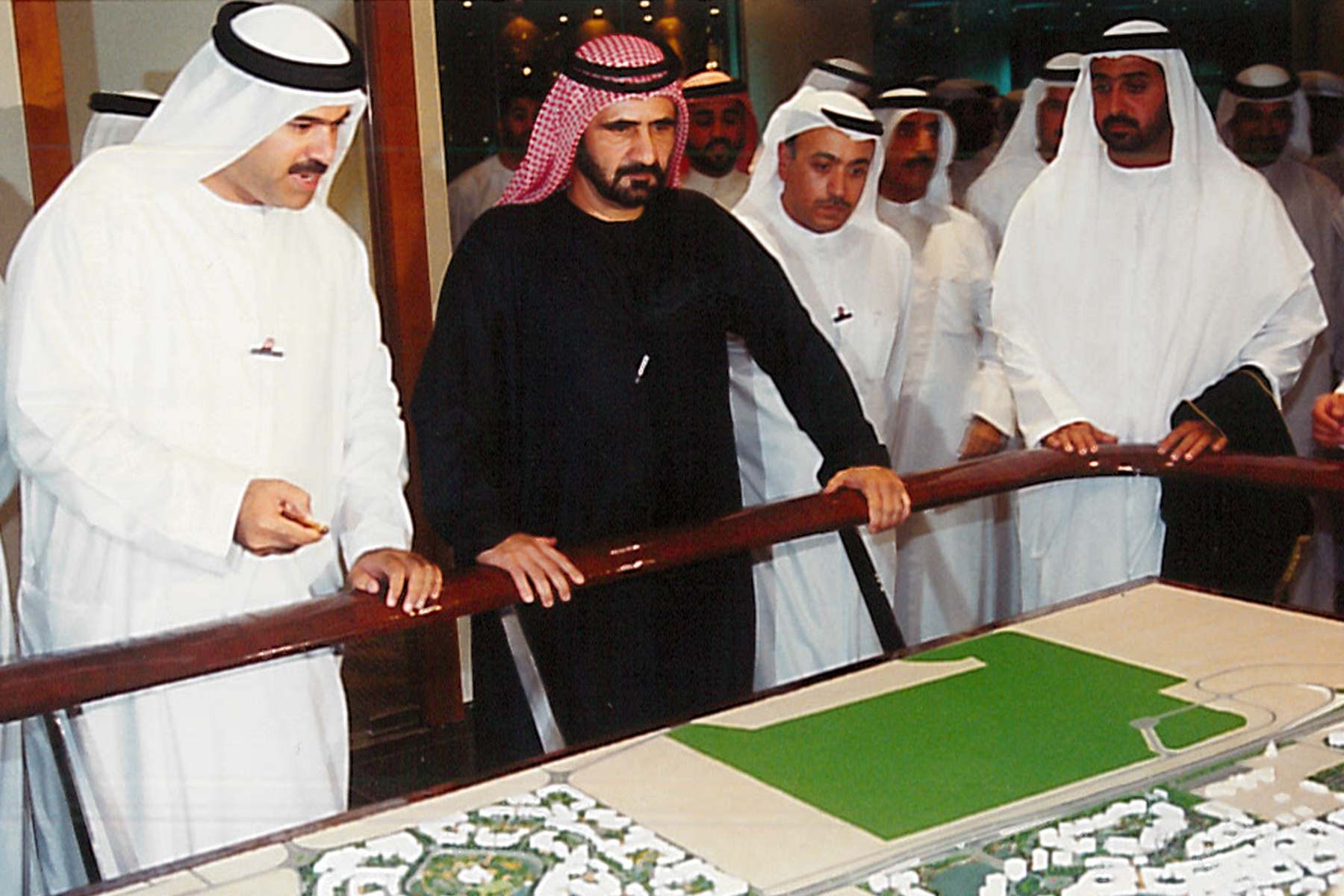 محمد بن راشد يستمع من محمد القرقاوي إلى شرح عن مخطط مدينة دبي للانترنت عام 2000